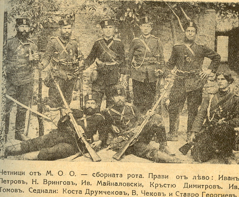 Четници от Македоно-одринското опълчение. Прави: Иван Петров, Никола Врингов от Емборе, Иван Майналовски от Косинец, Кръстю Димитров, Иван Томов. Седнали: Коста Друмчеков, Васил Чеков от Върбени, Ставро Георгиев от Емборе.